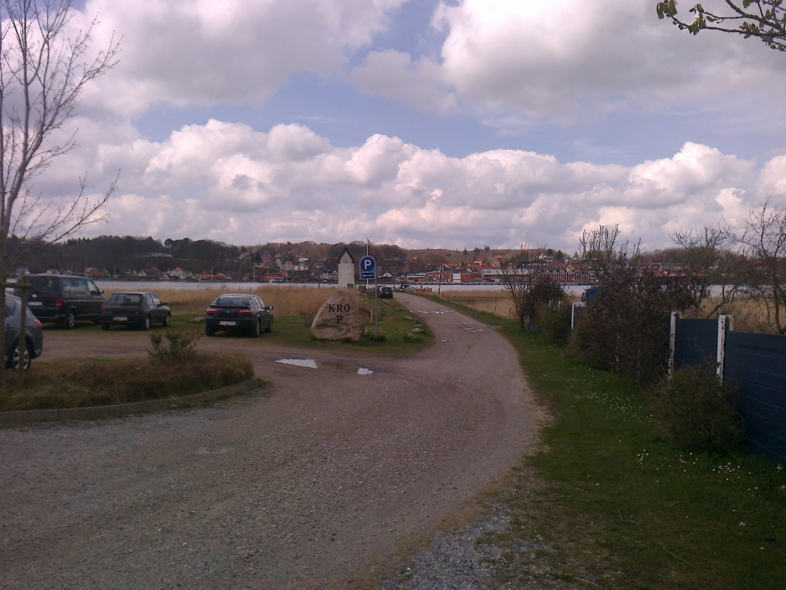 Fra Hadsund Syd Station var der 3-400 m ned til færgestedet